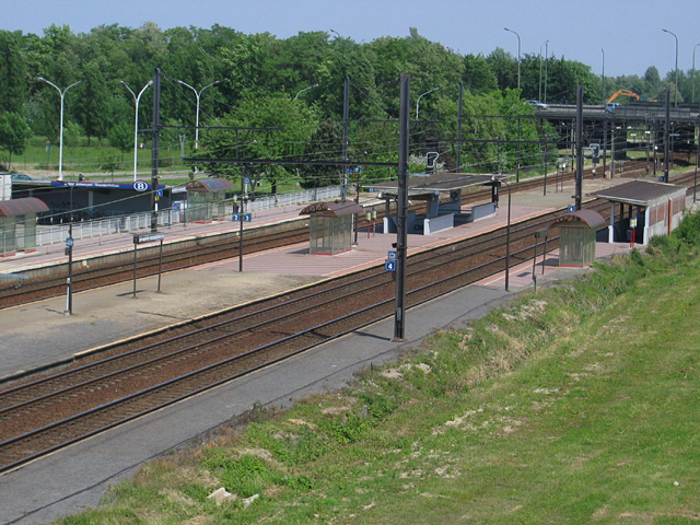 Station Antwerpen-Noorderdokken langs spoorlijn 12 (Antwerpen-Essen-Roosendaal)